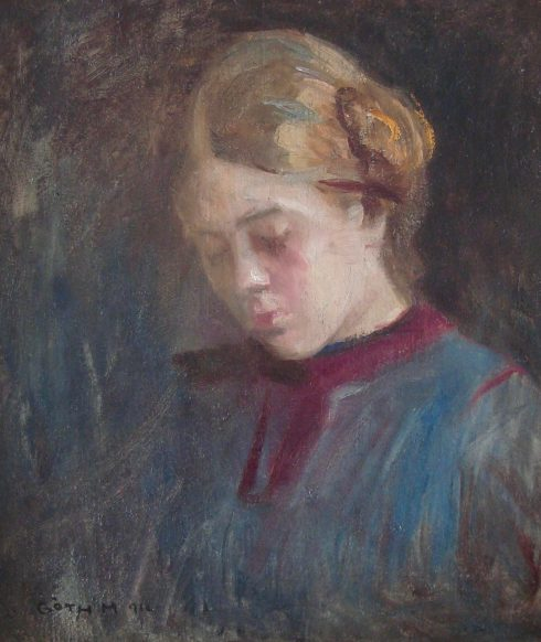 Maurice Goth (1873-1944) – Portret van dochter Sarika Goth 1912 – Olieverf op doek – 53 x 45 cm – Gesigneerd en gedateerd 1912